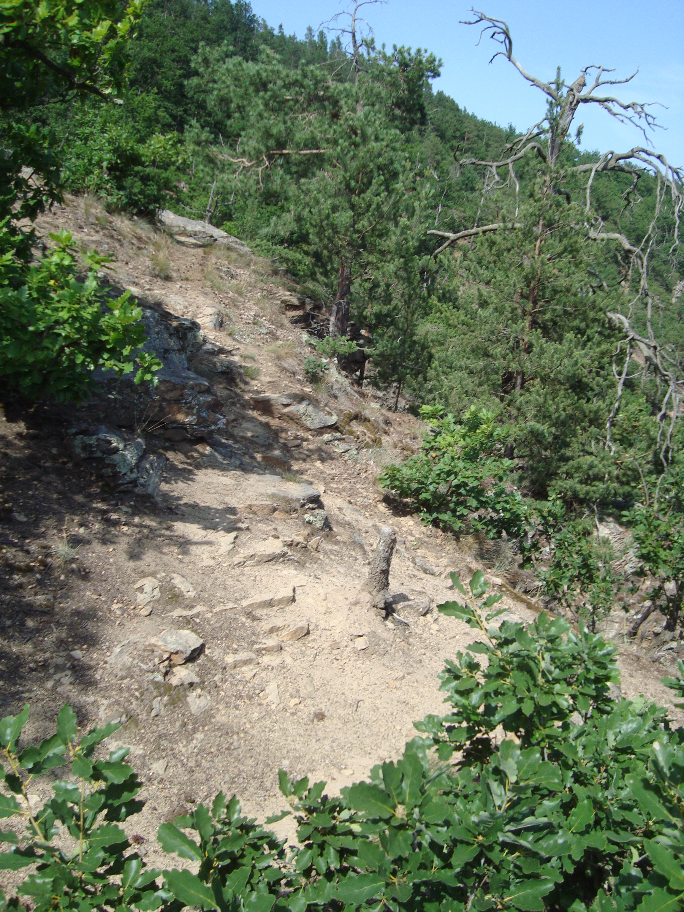 Přírodní rezervace Velká skála, Přírodní park Střední Pojihlaví, Česká republika, jižní Morava